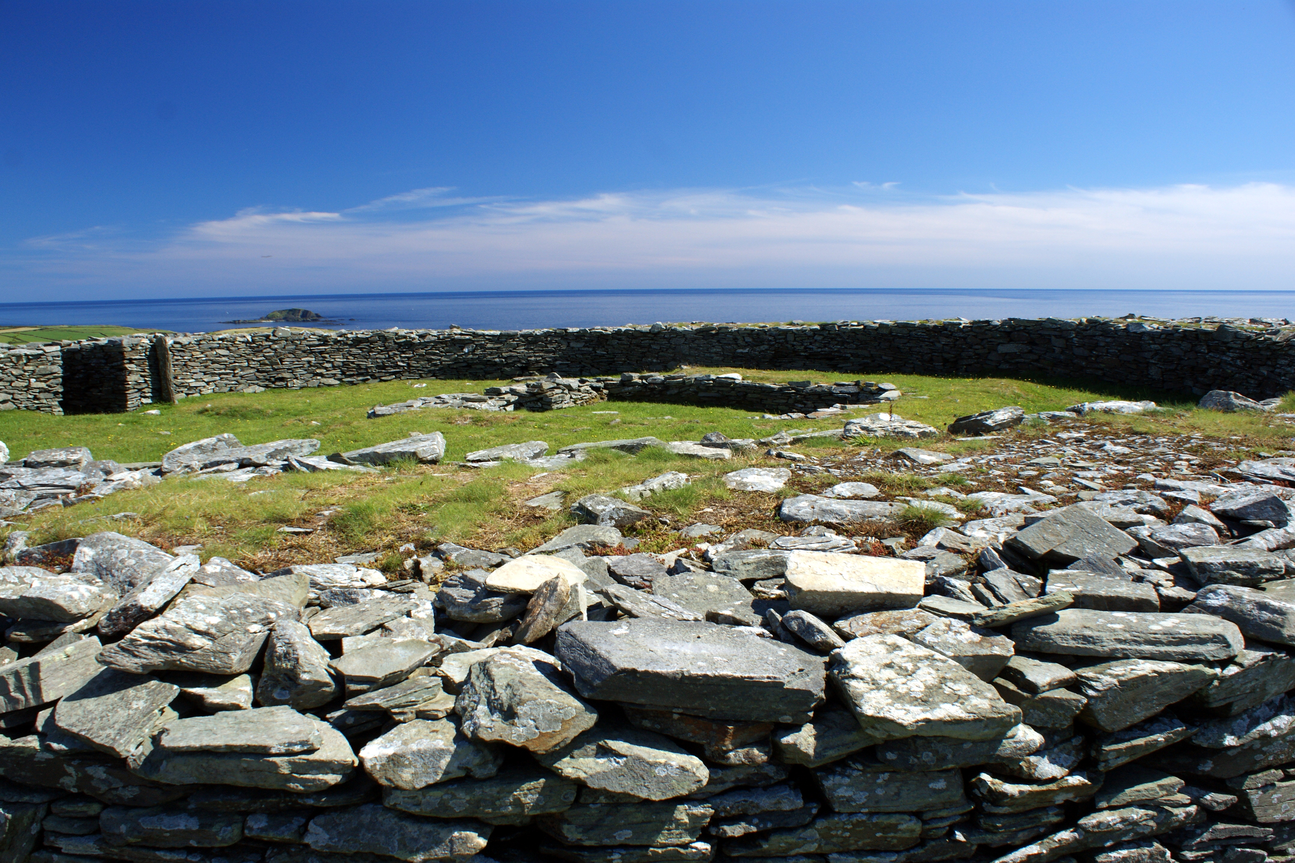 from outside